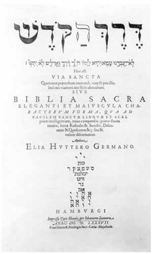 Strona tytułowa Hebrajskiej Biblii Huttera wydanej jako Derekh ha-Kodesh („Droga Świętości”) przez Eliasa Huttera (Hamburg 1587).